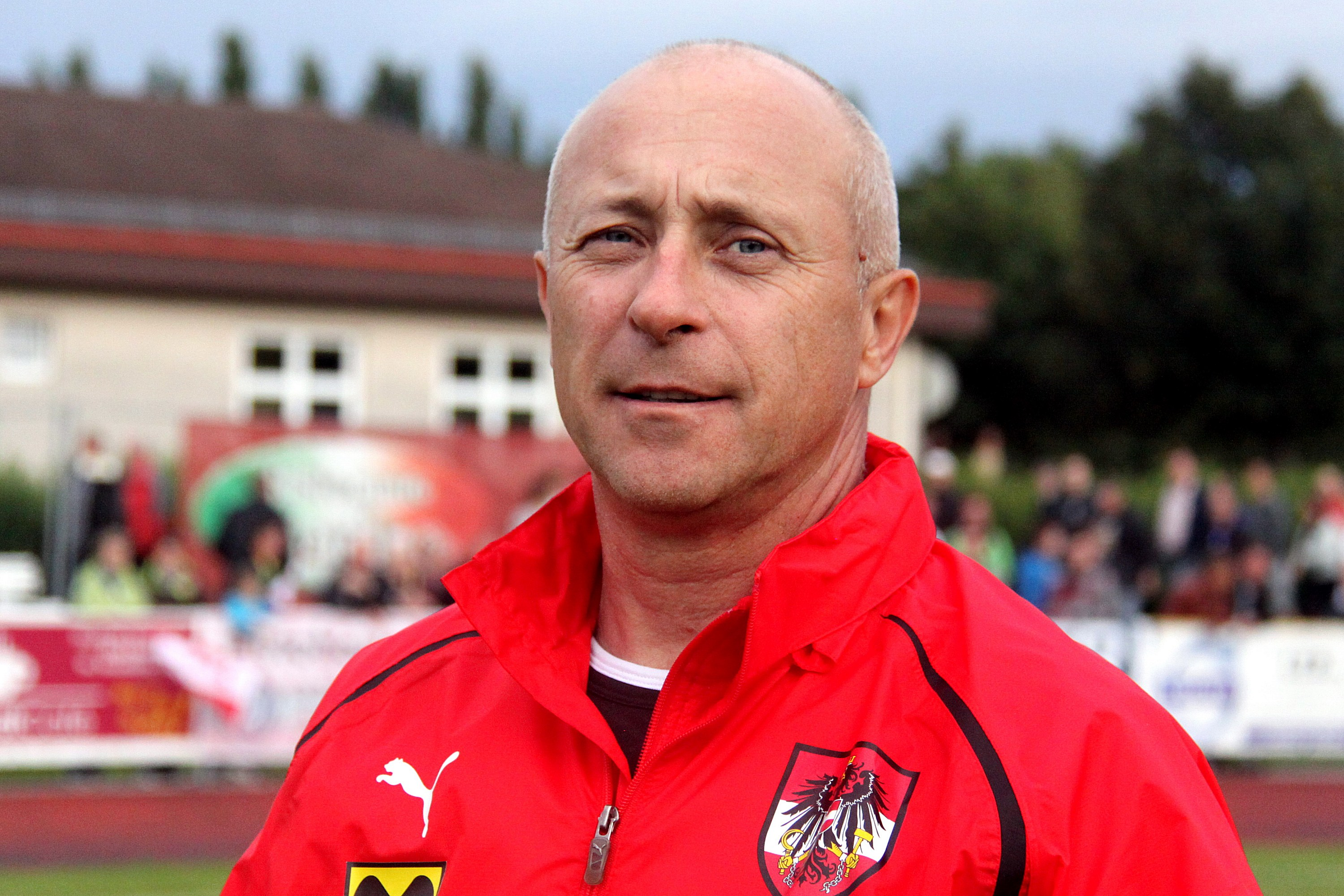 Qualifikationsspiel zur U-19 Fußball-Europameisterschaft: Österreich] gegen Frankreich am 10. Juni 2013 (0:1)] in Traiskirchen.] - Das Foto zeigt den österreichischen Co-Trainer Johann Füzi. en Qualification for the 2013 UEFA European Under-19 Football Championship qualification Austria vs. France (0:1) on 2013-2013-06-10 in Traiskirchen. – The photo shows co-teamchef Johann Füzi (Austria).